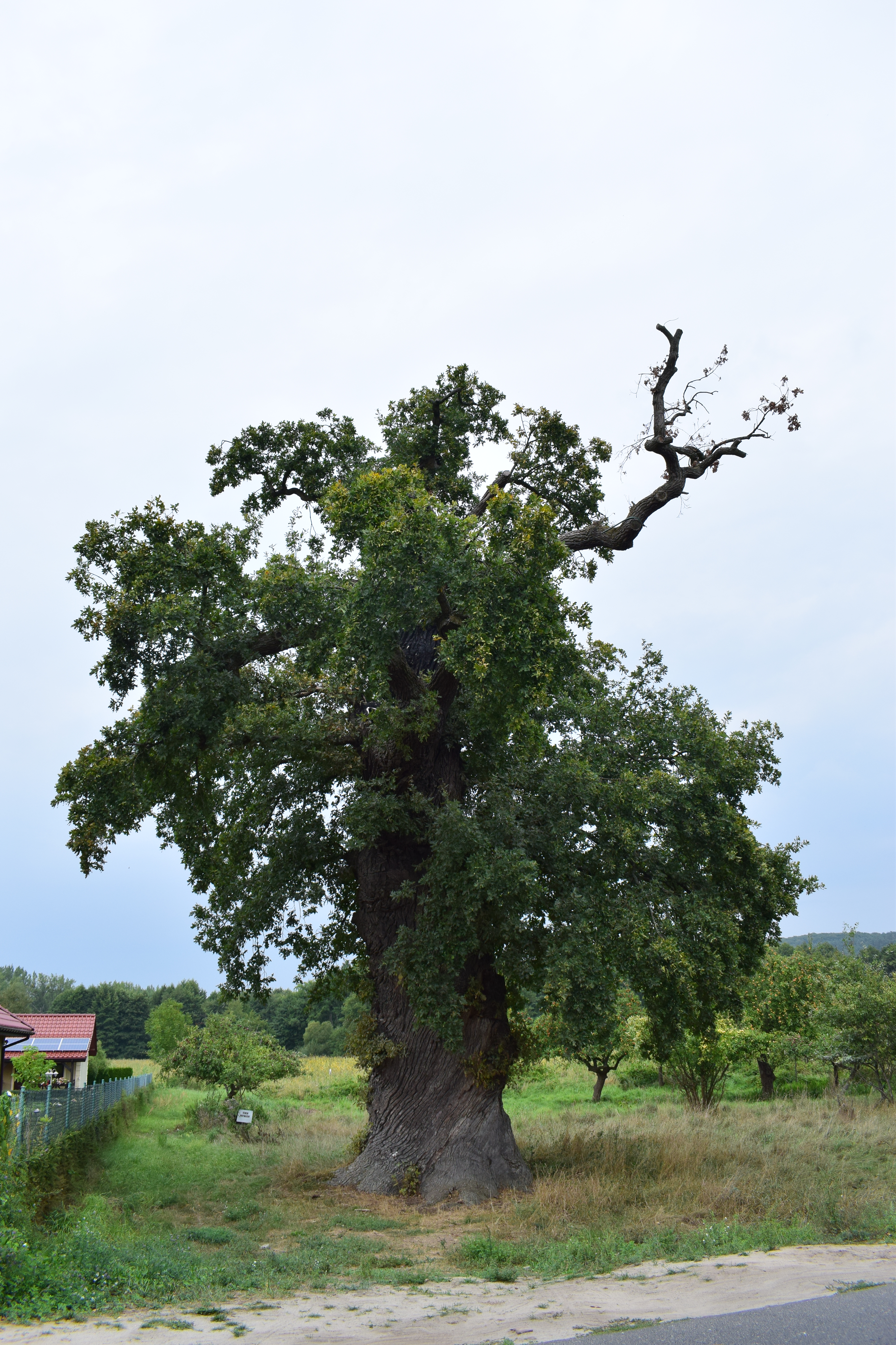 Die Eiche „Dab Prastary“ in Wapnica, Insel Wolin.